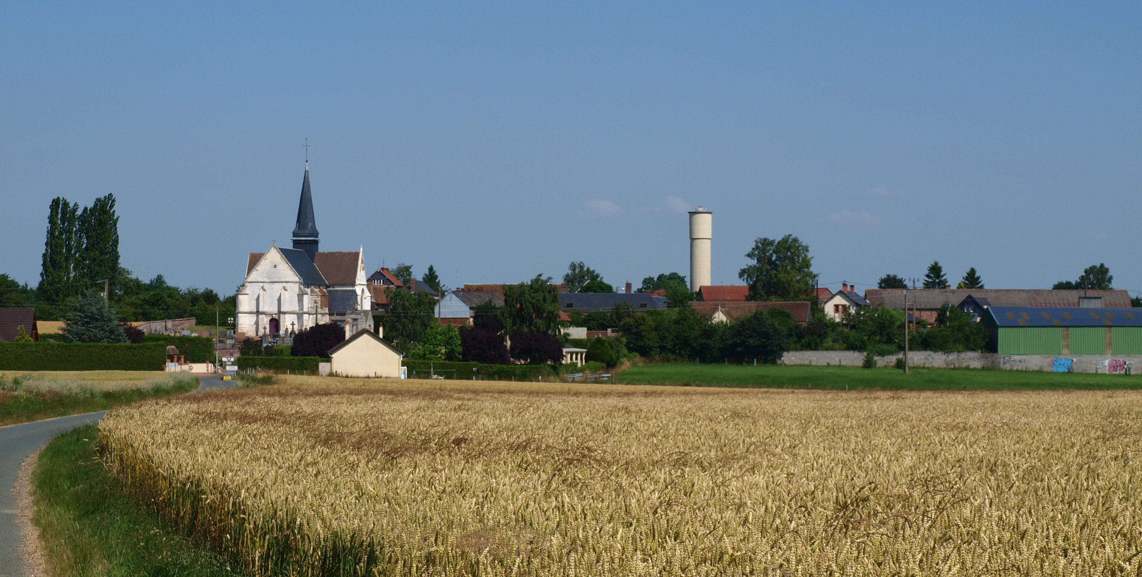 Verderel-lès-Sauqueuse (Oise, France)